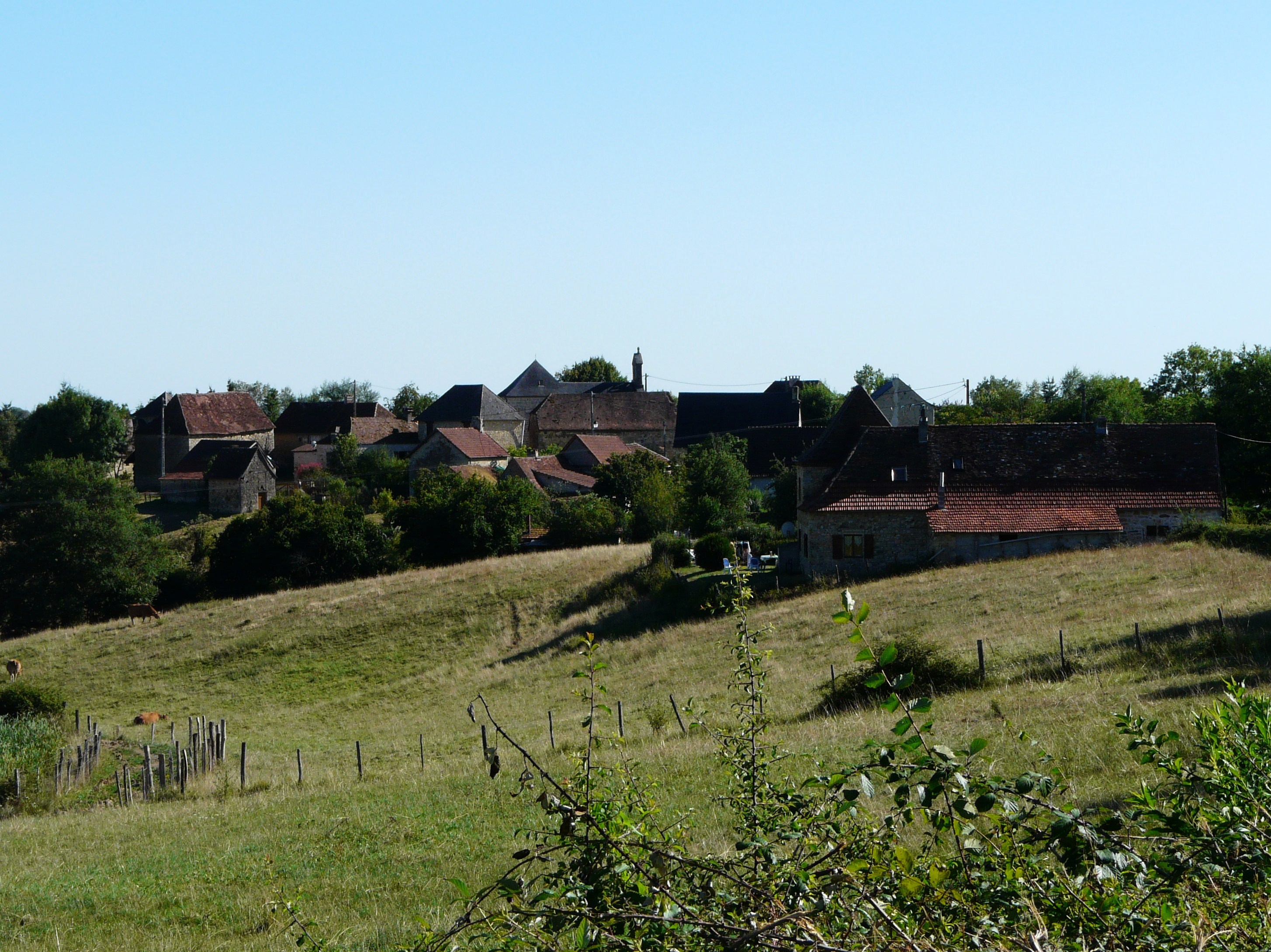 Le village de La Chapelle-Saint-Jean, Dordogne, France.